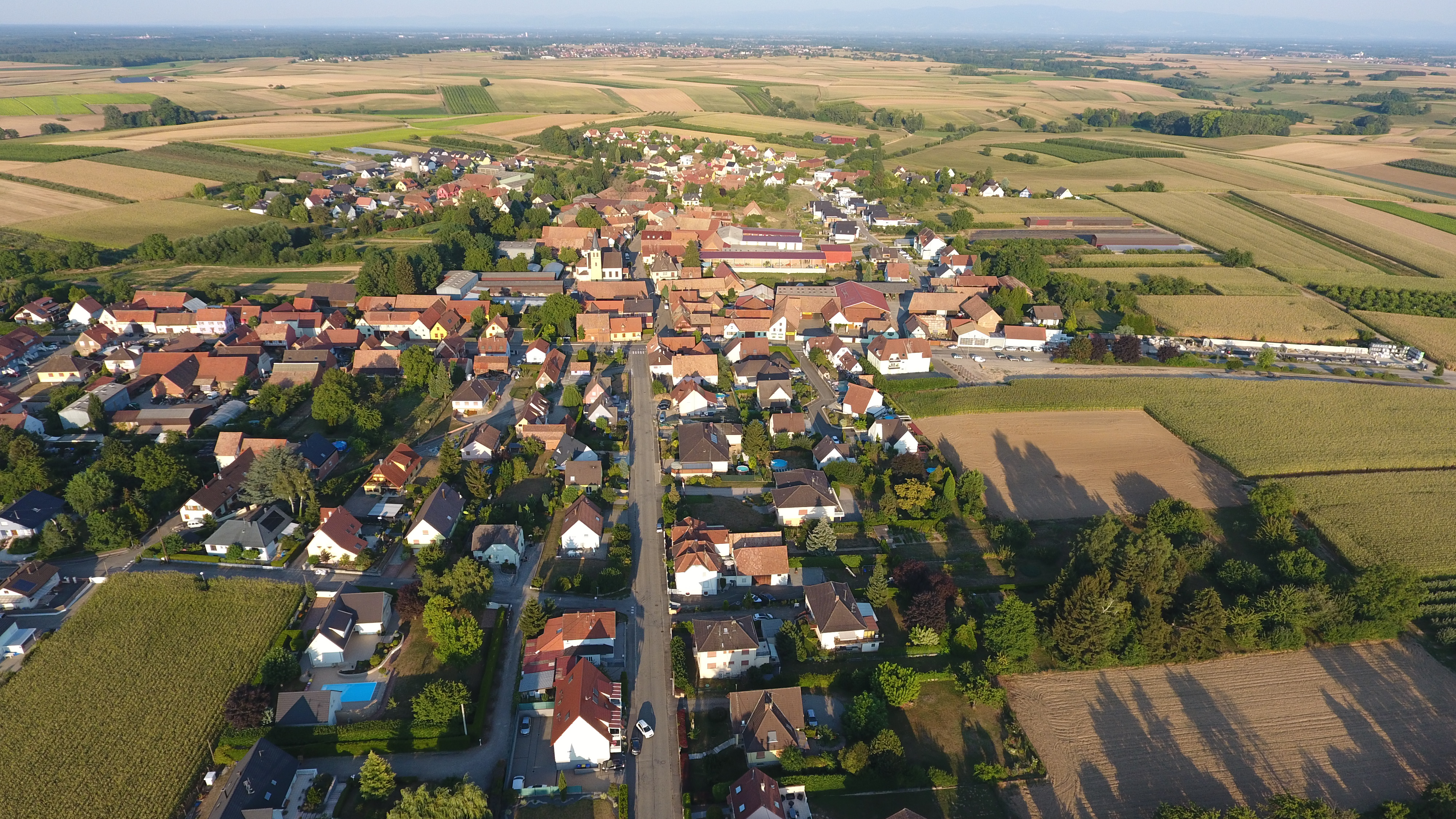 Vue aérienne de Kriegsheim